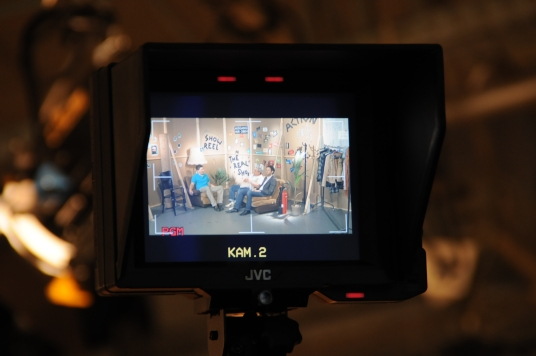 Blick durch die Kamera bei einer Aufzeichnung der Sendung The Show Real (Alex Offener Kanal Berlin)